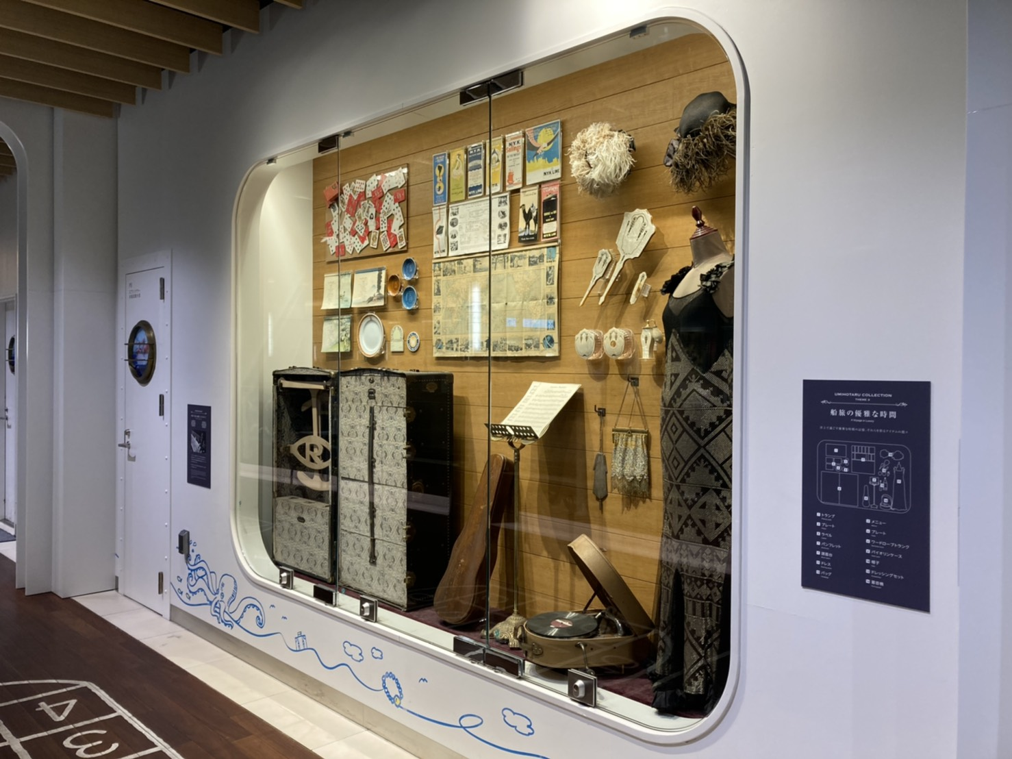 海ほたるパーキングエリアにある日本郵船のパンフレット